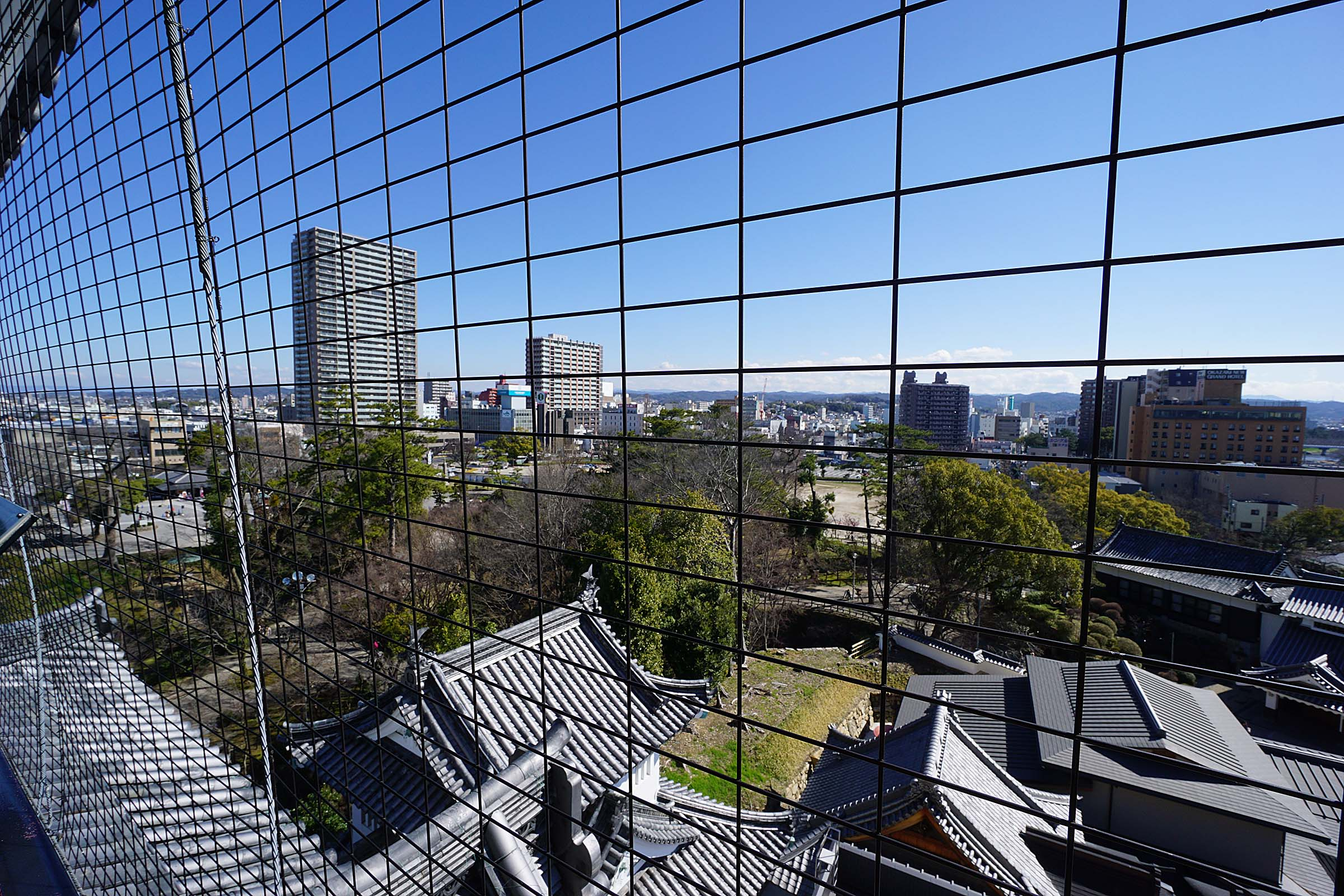 Okazaki Castle / 岡崎城